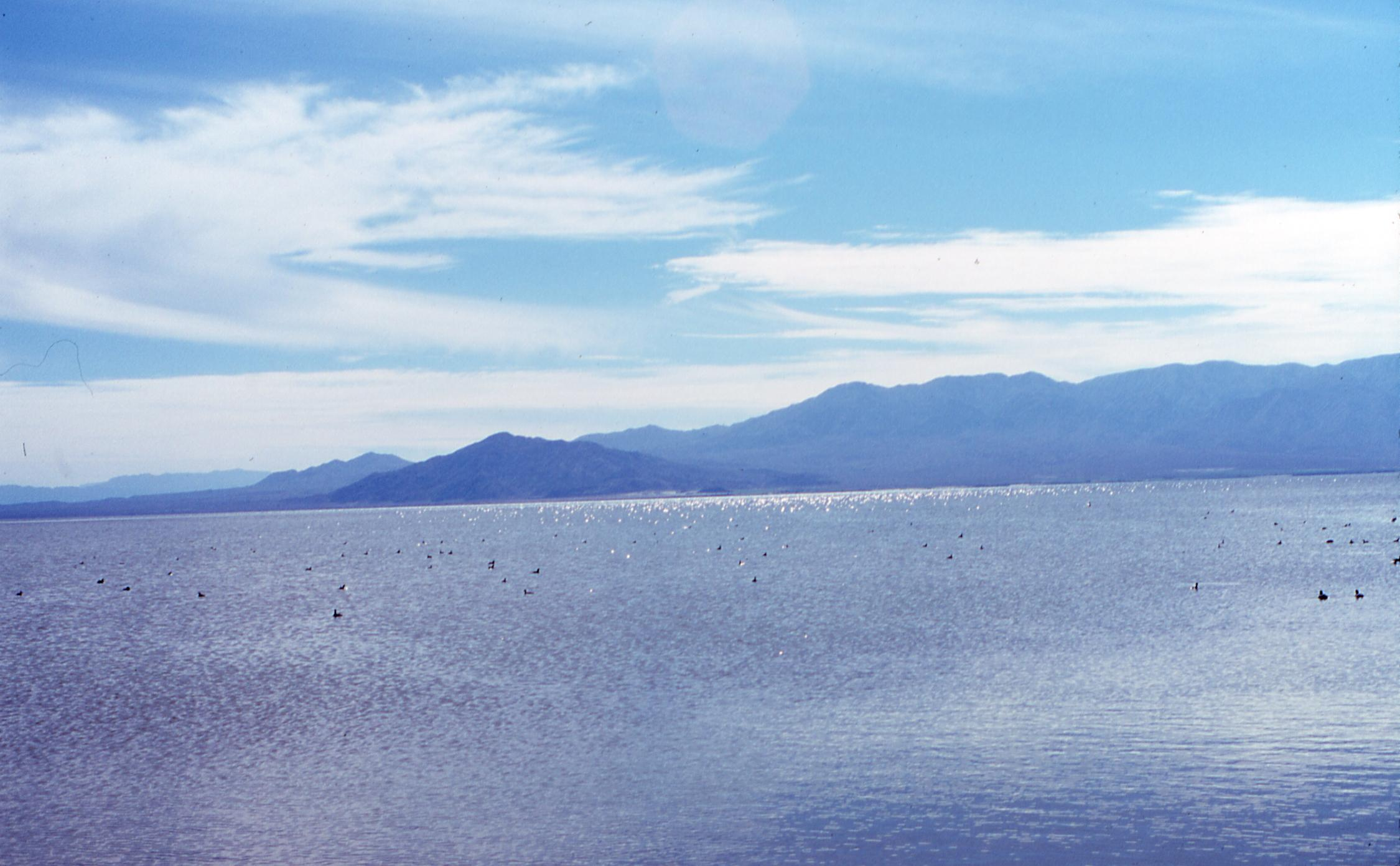 Der Saltonsee in Südkalifornien.